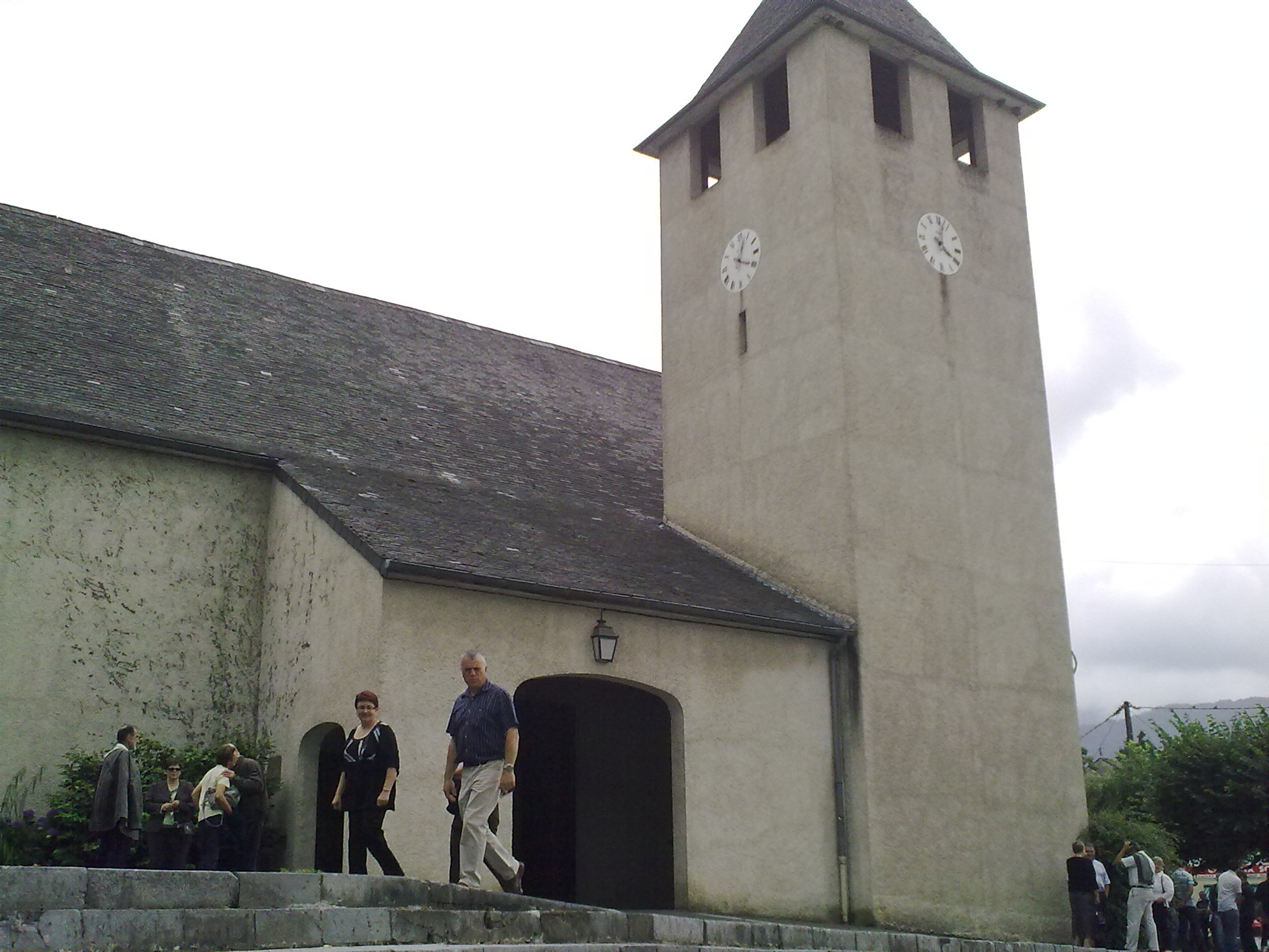 Arette le 4 juillet 2010.